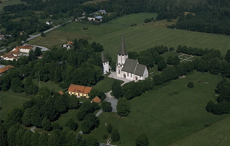 Motiv: Lärbro kyrka Nyckelord: Flygbilder, Riksintressen Kategori: KyrkomiljöLärbro kyrka